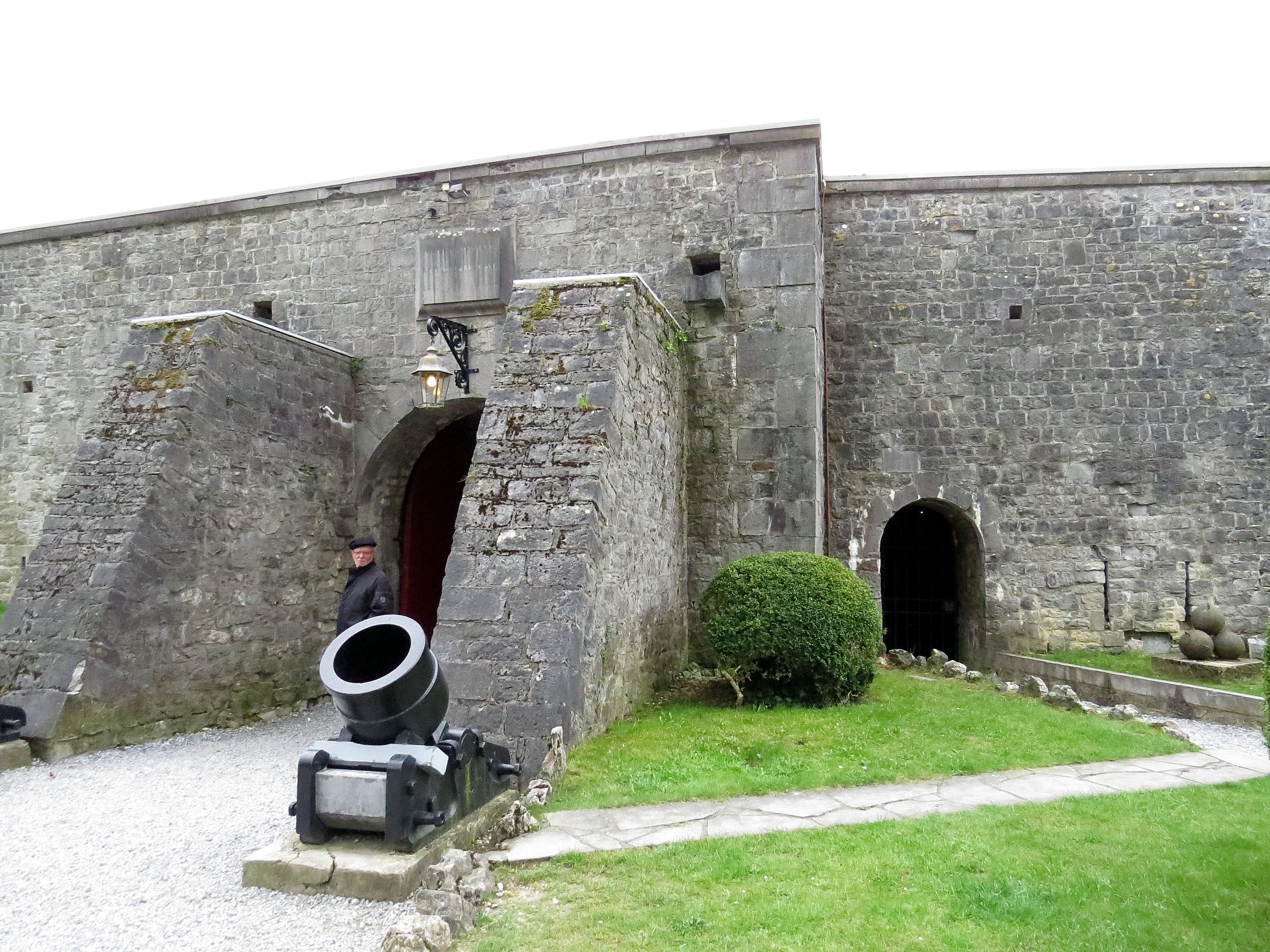 Festung Dinant, Mörser vor dem Eingang